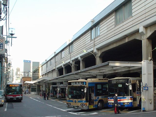 機材:SONY DSC-U40 '05.11.16 綱島駅にて投稿者撮影